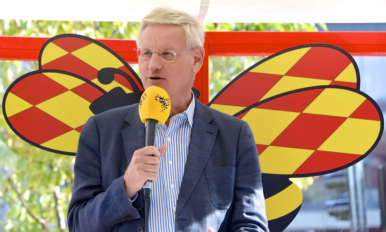 Carl Bildt utfrågas på Expressens valscen på Sergels torg i Stockholm den 6 september 2014.